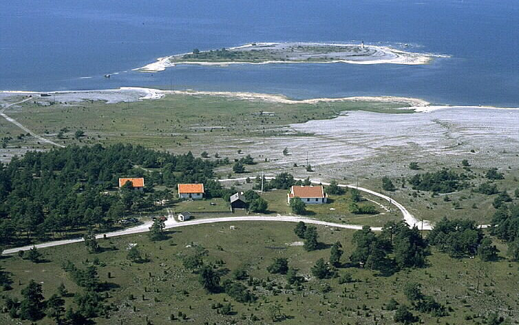 Motiv: Aurgrunn Nyckelord: Flygbilder, Naturreservat, Riksintressen Kategori: Kust- och skärgårdsmiljö Aurgrunn